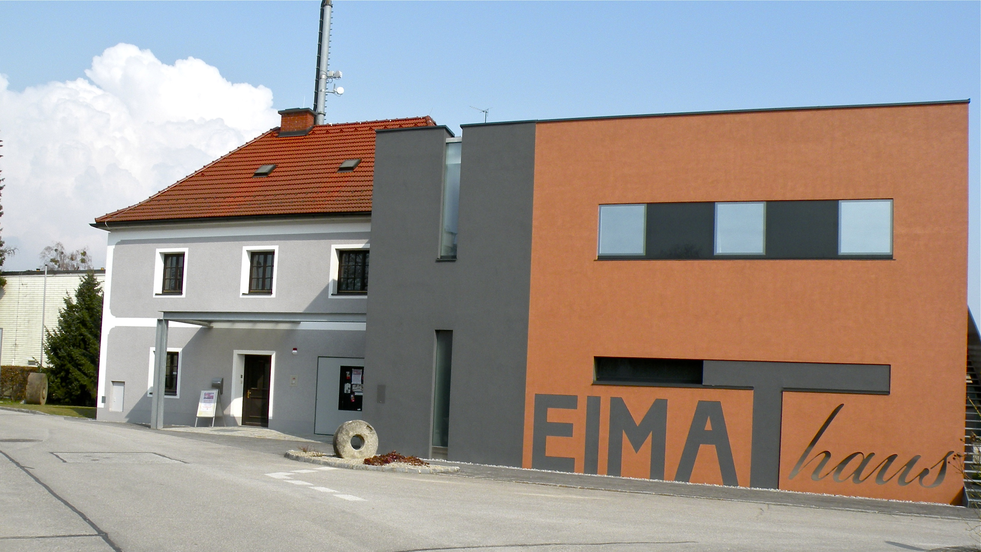 Heimathaus-Stadtmuseum Perg, nach der Renovierung und Erweiterung 2010